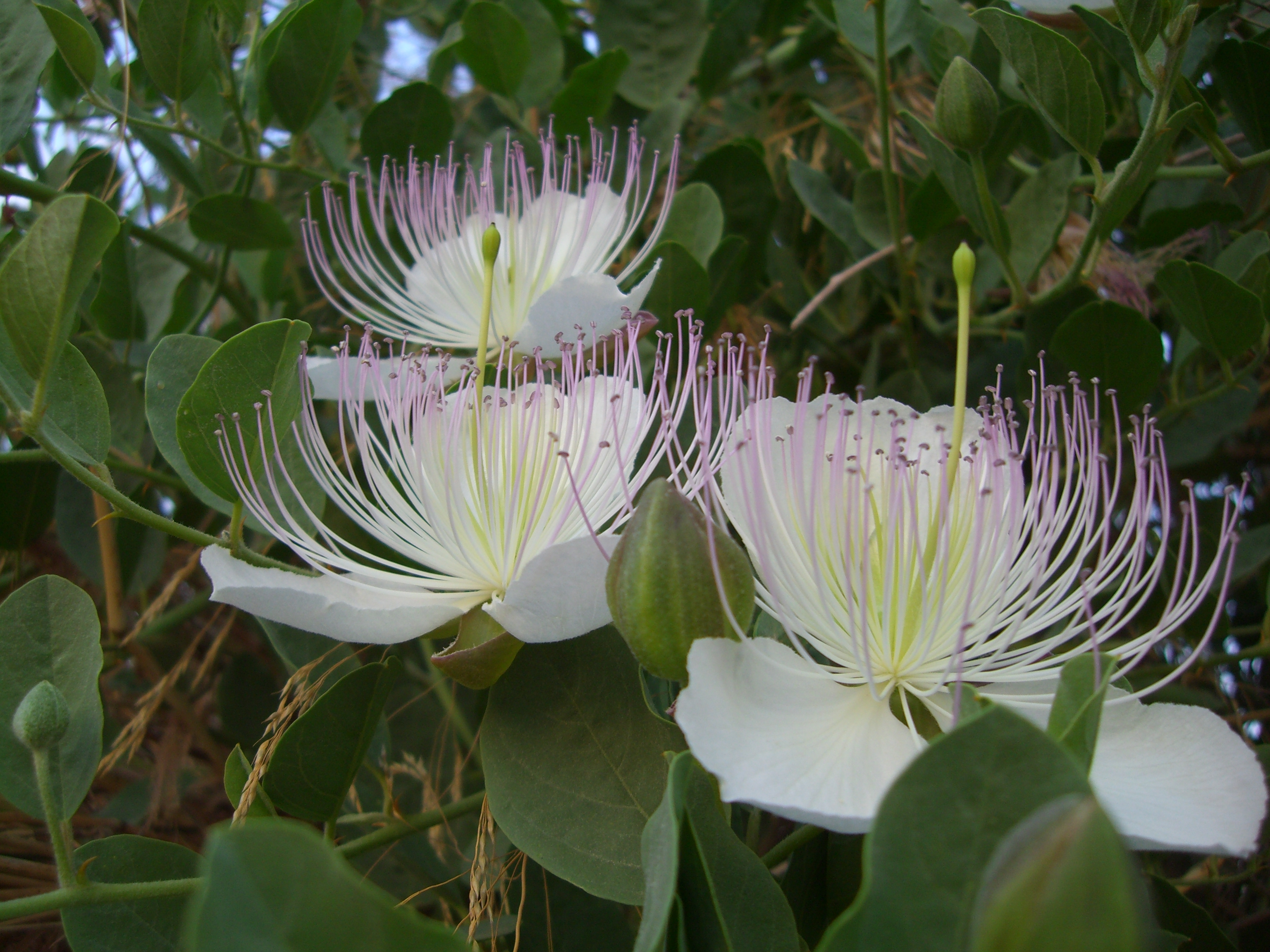 del rosal de mi jardin